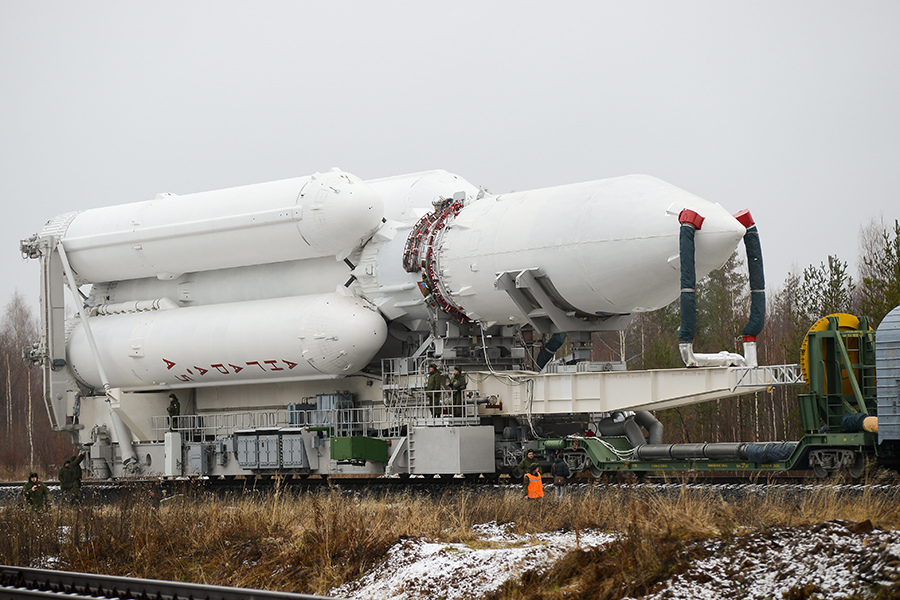 Вывоз ракеты-носителя «Ангара-А5» на стартовый комплекс космодрома Плесецк (Архангельская обл.)